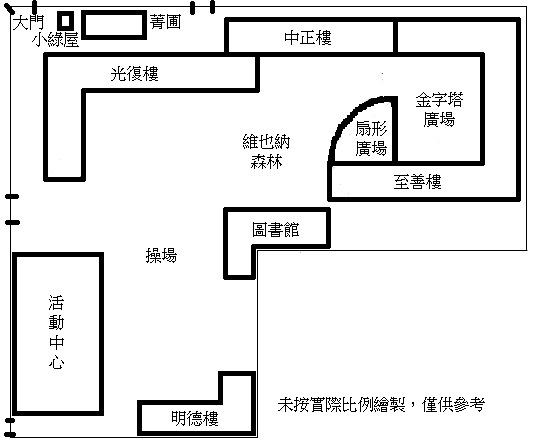 參考了Google地圖，並加上我自己對校園的了解。一直想為「北一女中」這頁面加上類似的圖，但找尋不到，只好自己動手了（笑）。